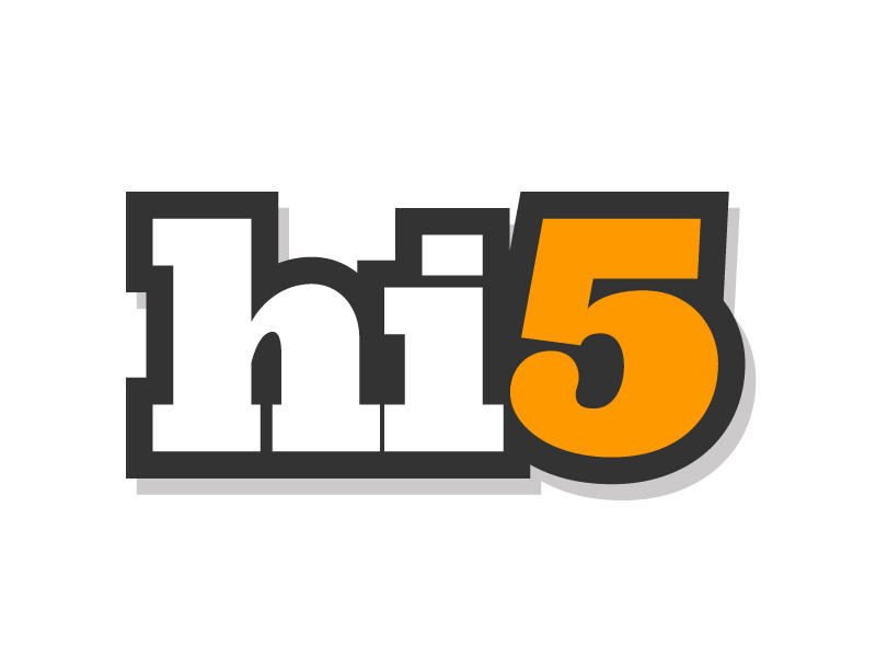 hi5_logo